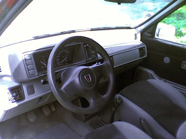 Rover 100